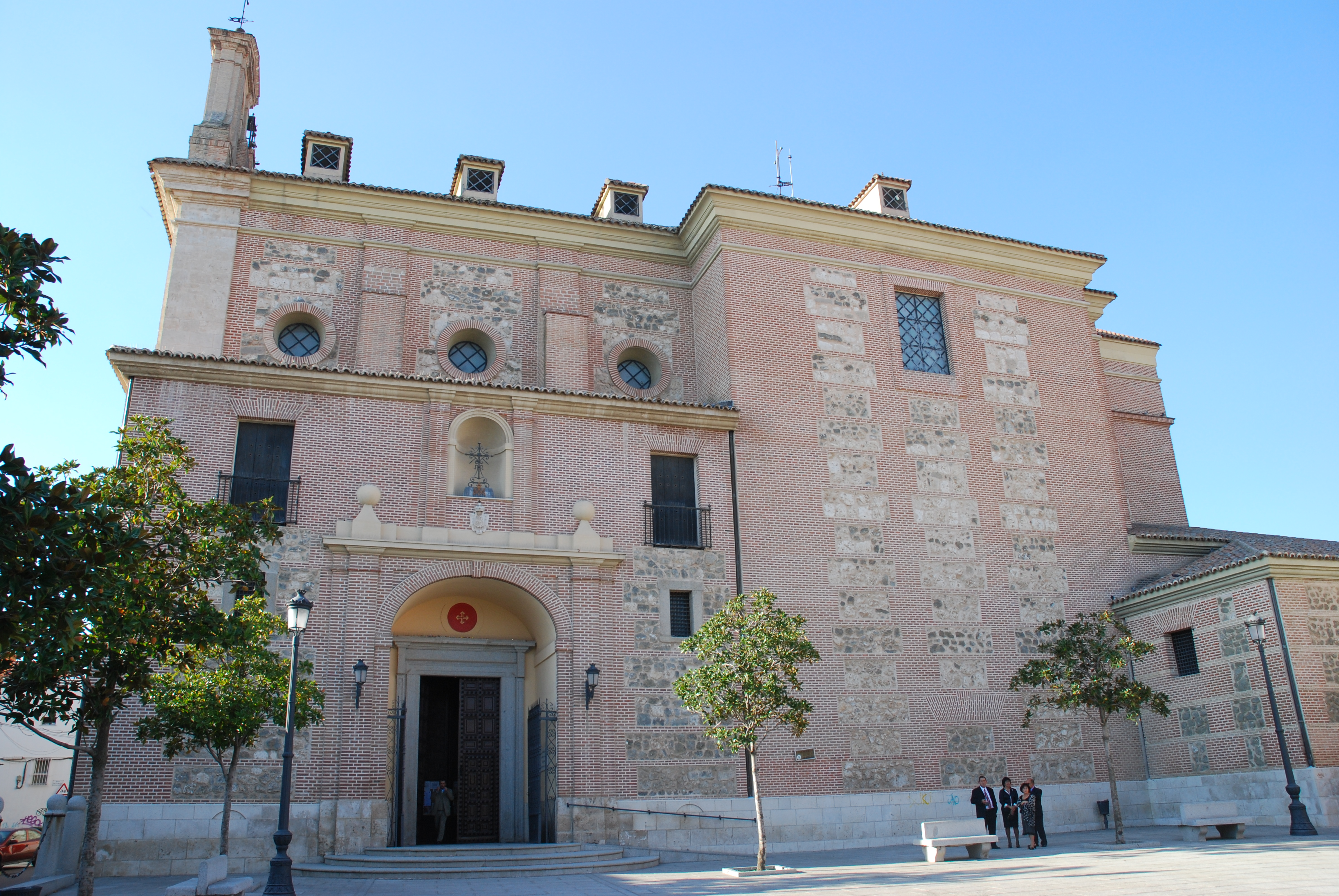 Lateral del Santuario de la Virgen de la Caridad de Illescas (Toledo, Castilla-La Mancha, España).